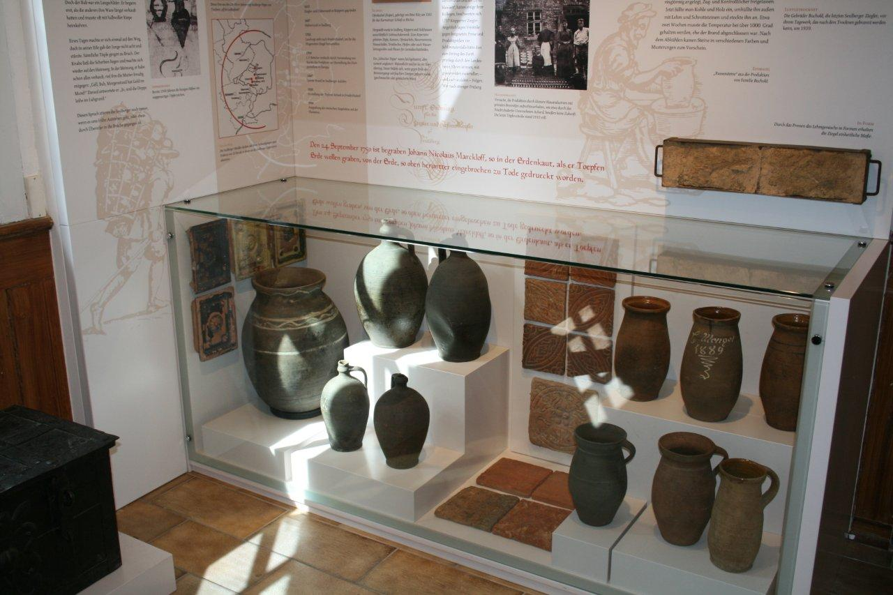 Das Bild zeigt eine Schauvitrine aus dem Heimatmuseum Seulberg mit verschiedenen Tonerzeugnissen aus Seulberg